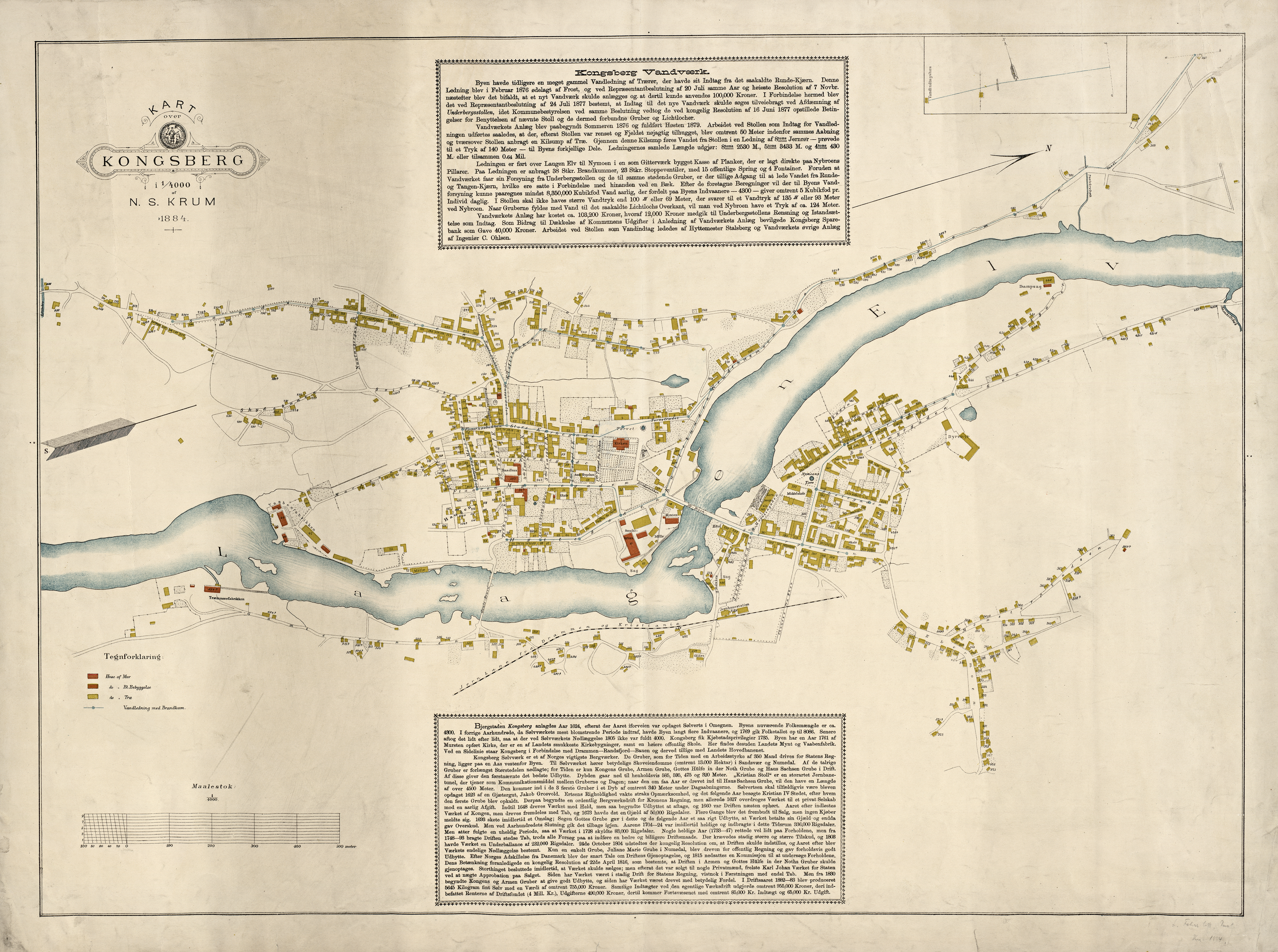 NS Krums kart over Kongsberg fra 1884.